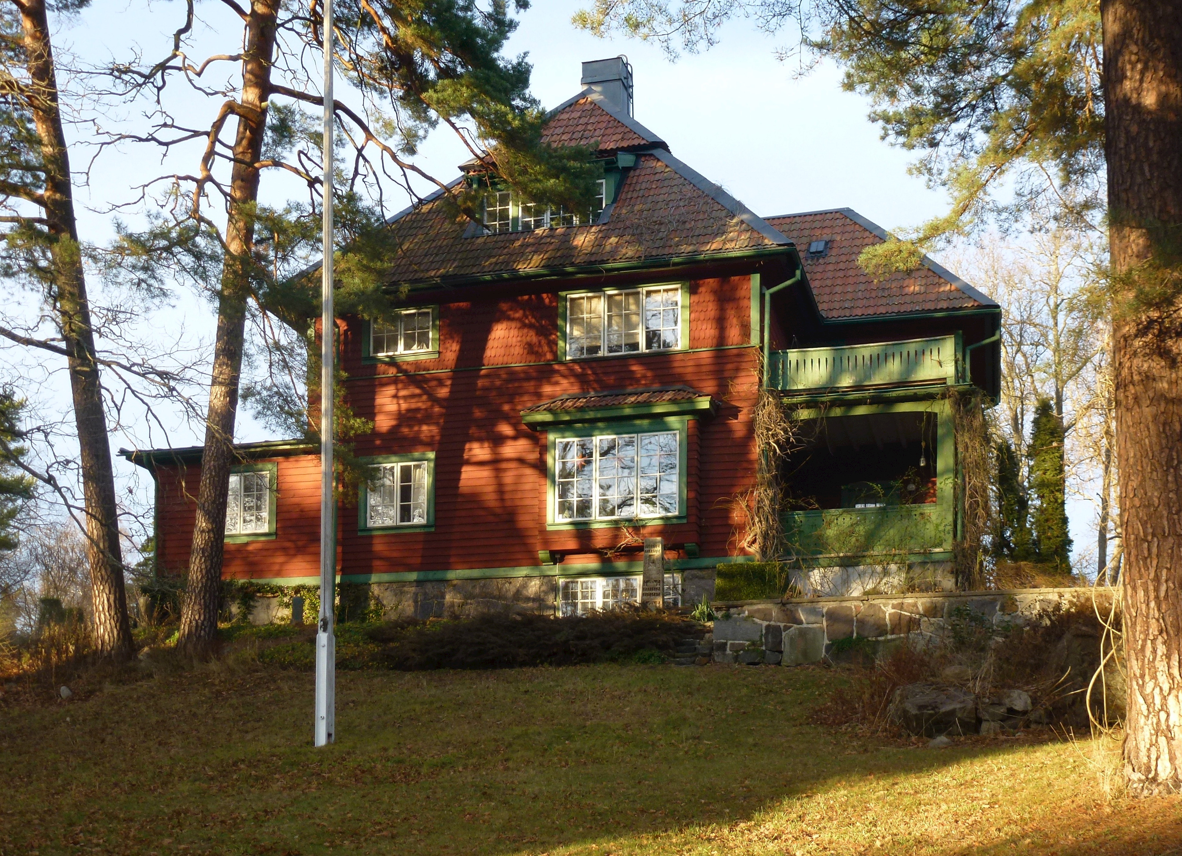 Villa Hesselman, Krokvägen 13, arkitekt Albin Brag